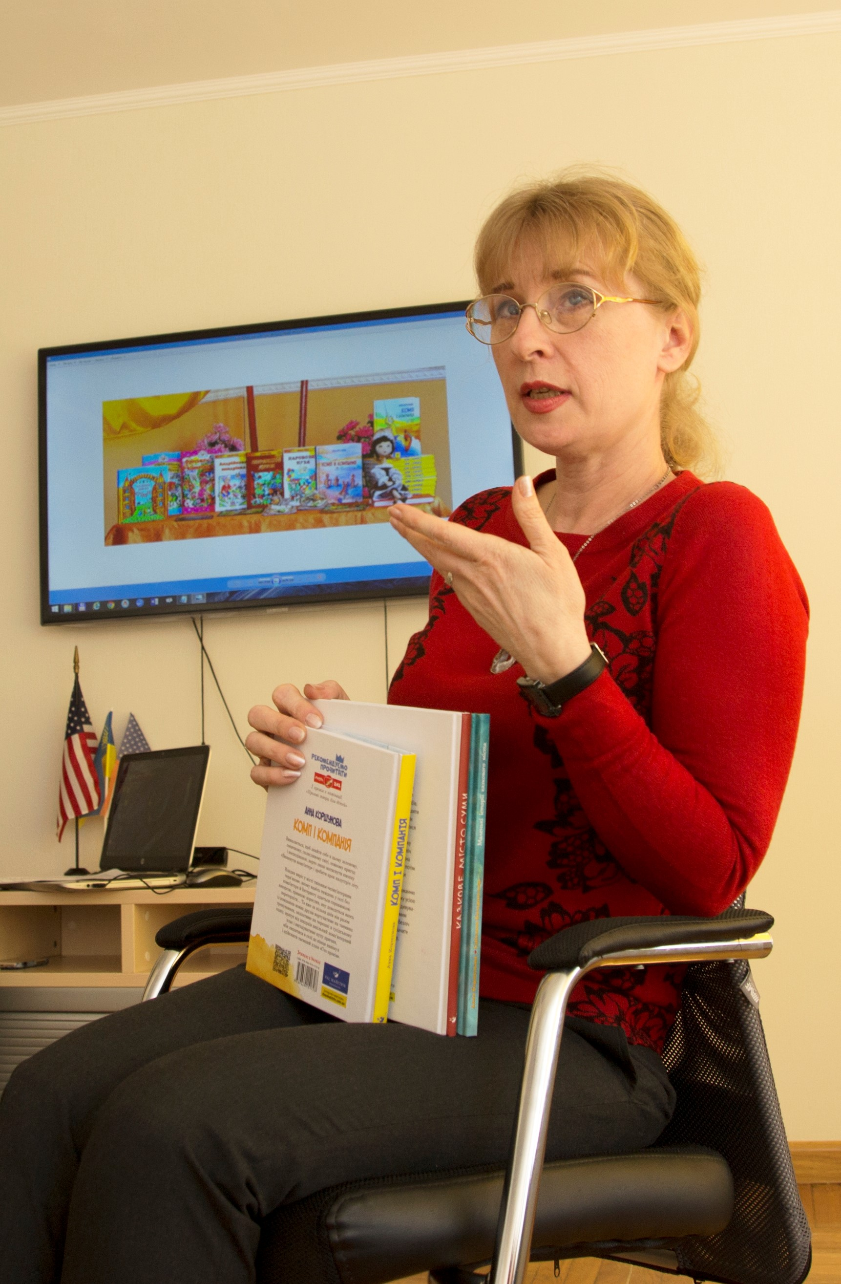 Анна Коршунова. Зустріч з письменницею у Сумській ОУНБ